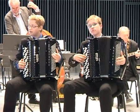 Fra "Trekkspillparade" på Akershus Festning